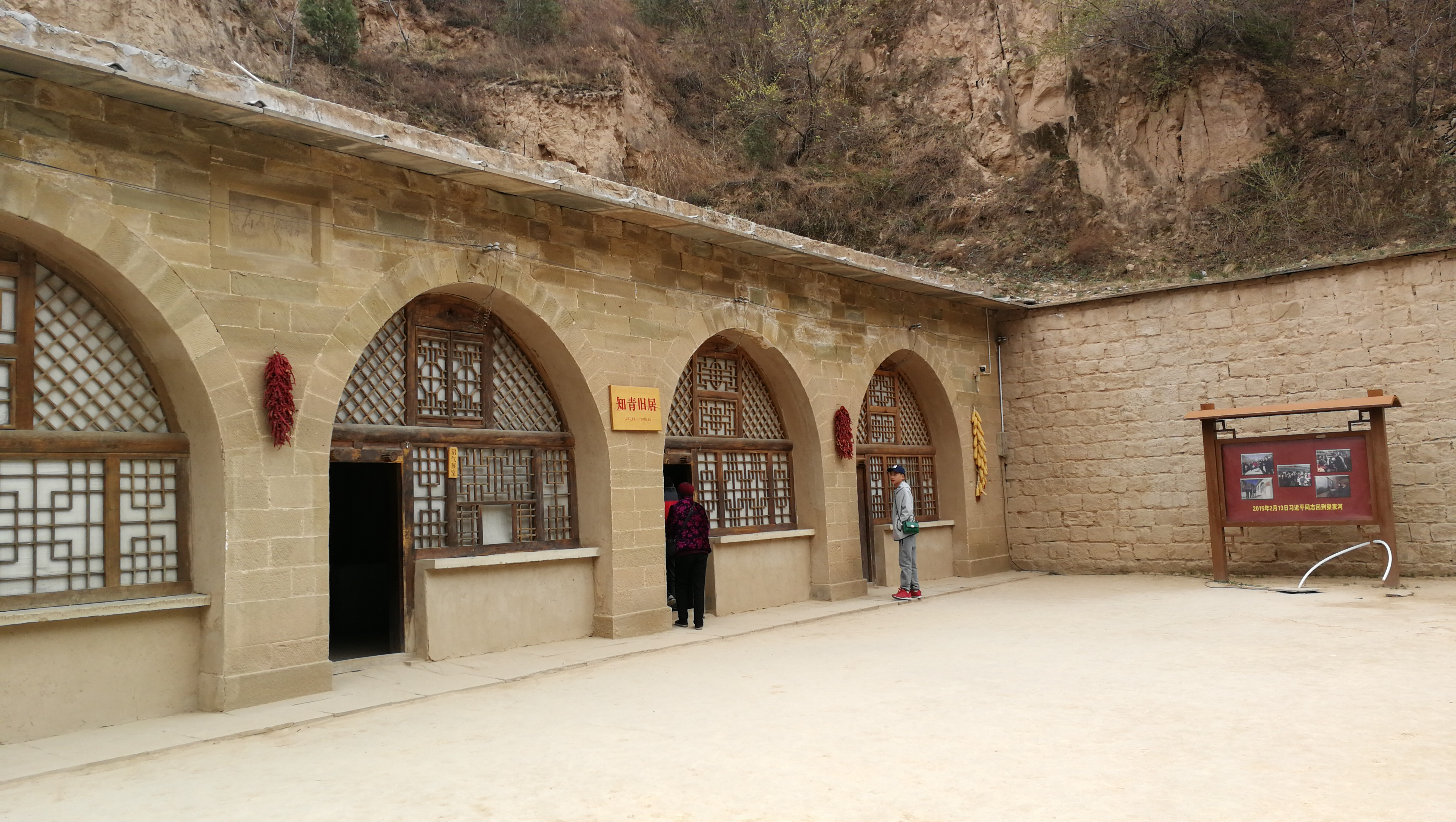 延安市延川县文安驿镇梁家河村